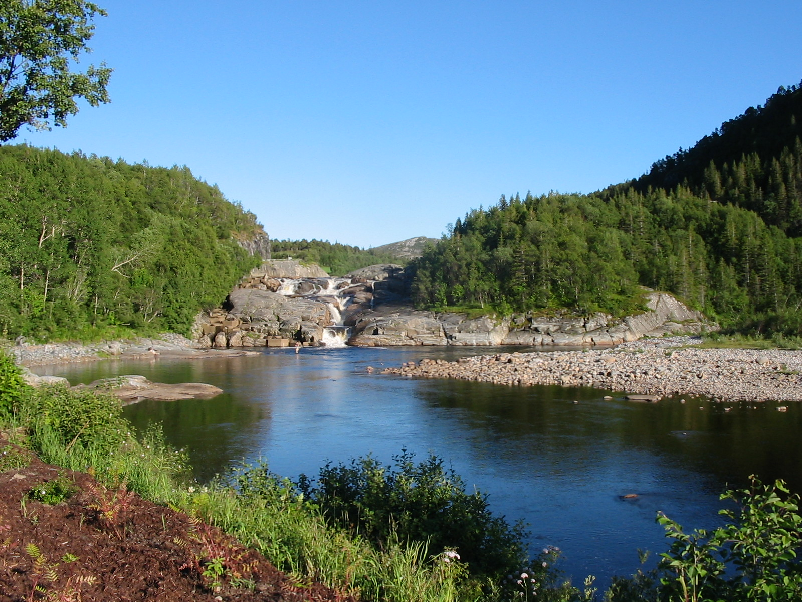 Normelandsfossen in Steinsdalselva, Osen, Sør-Trøndelag, Norway.